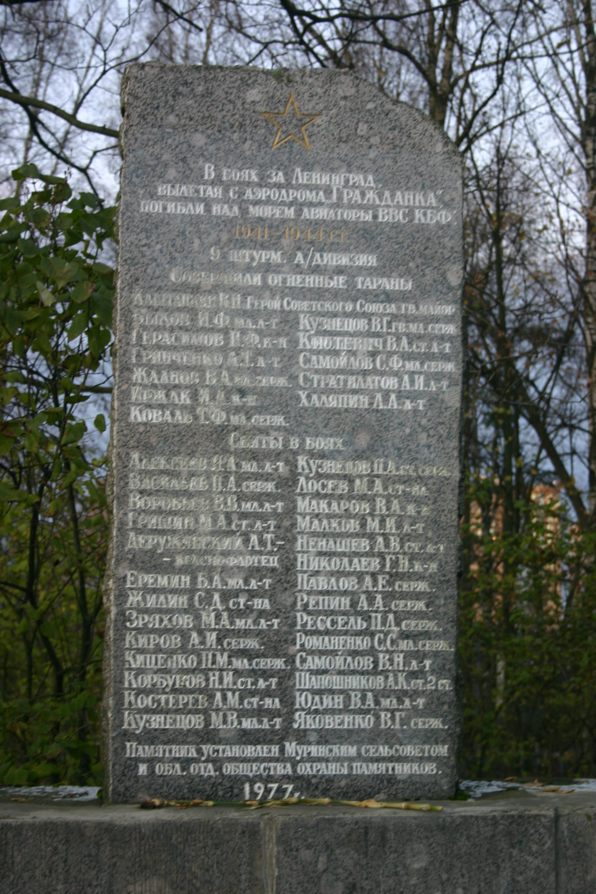 Десятая слева плита муринского мемориала пилотам.